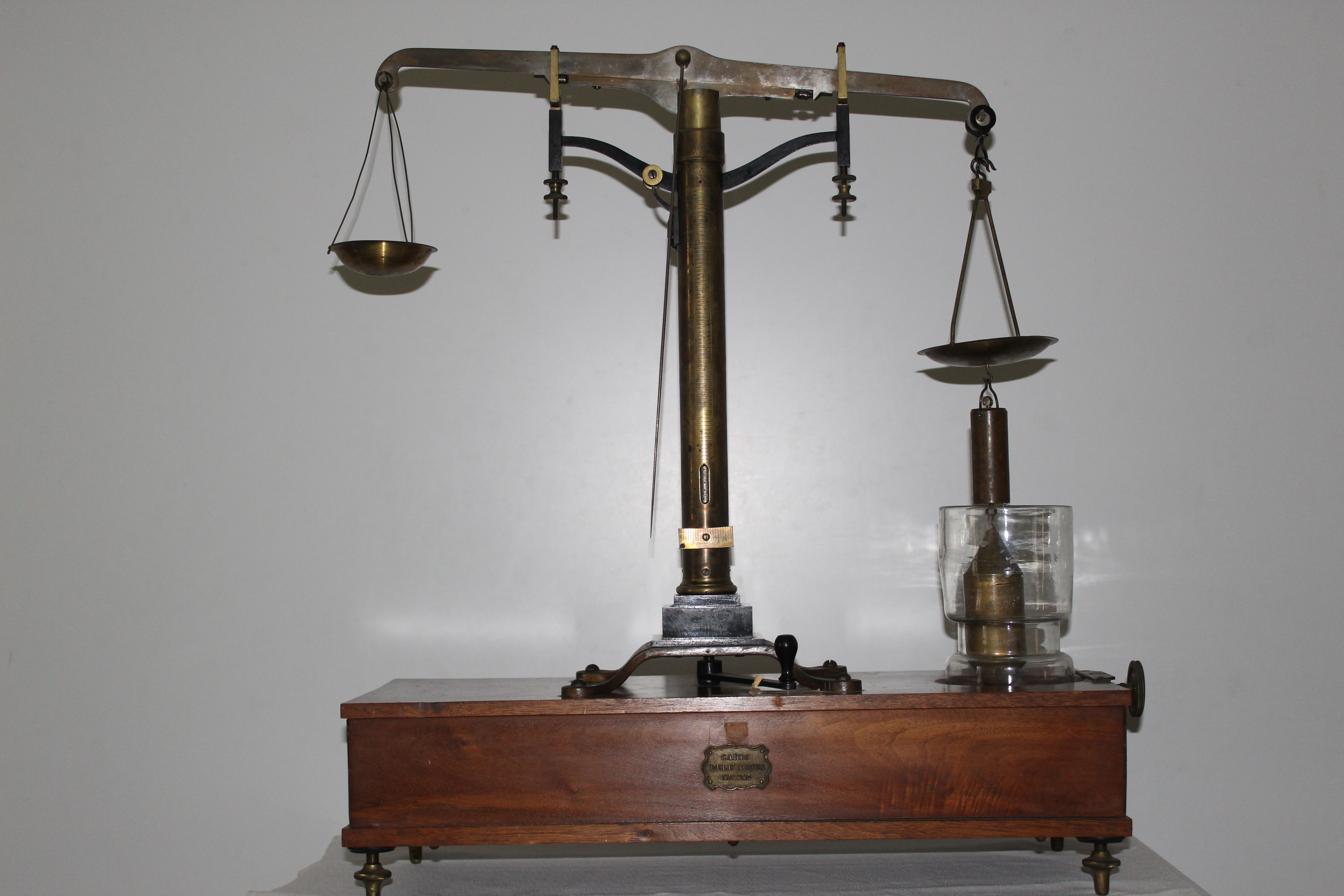 La bilancia idrostatica è un tipo di bilancia che serve per misurare la densità di un corpo utilizzando la spinta dell'acqua secondo il principio di Archimede. Se ne trova una prima descrizione nell'opera La Bilancetta di Galileo Galilei del 1586.